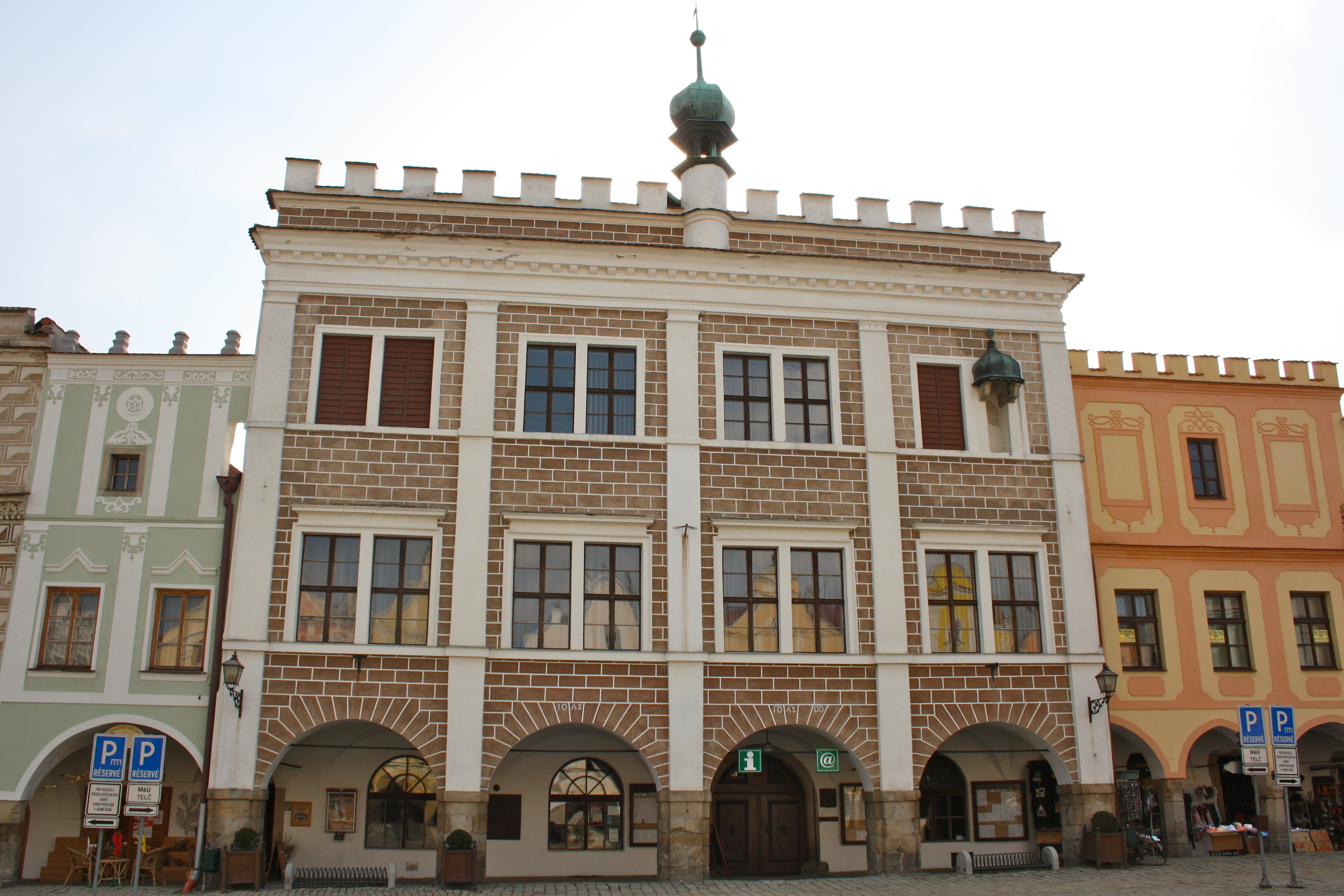 Radnice (Telč), nám. Zachariáše z Hradce 10, Telč